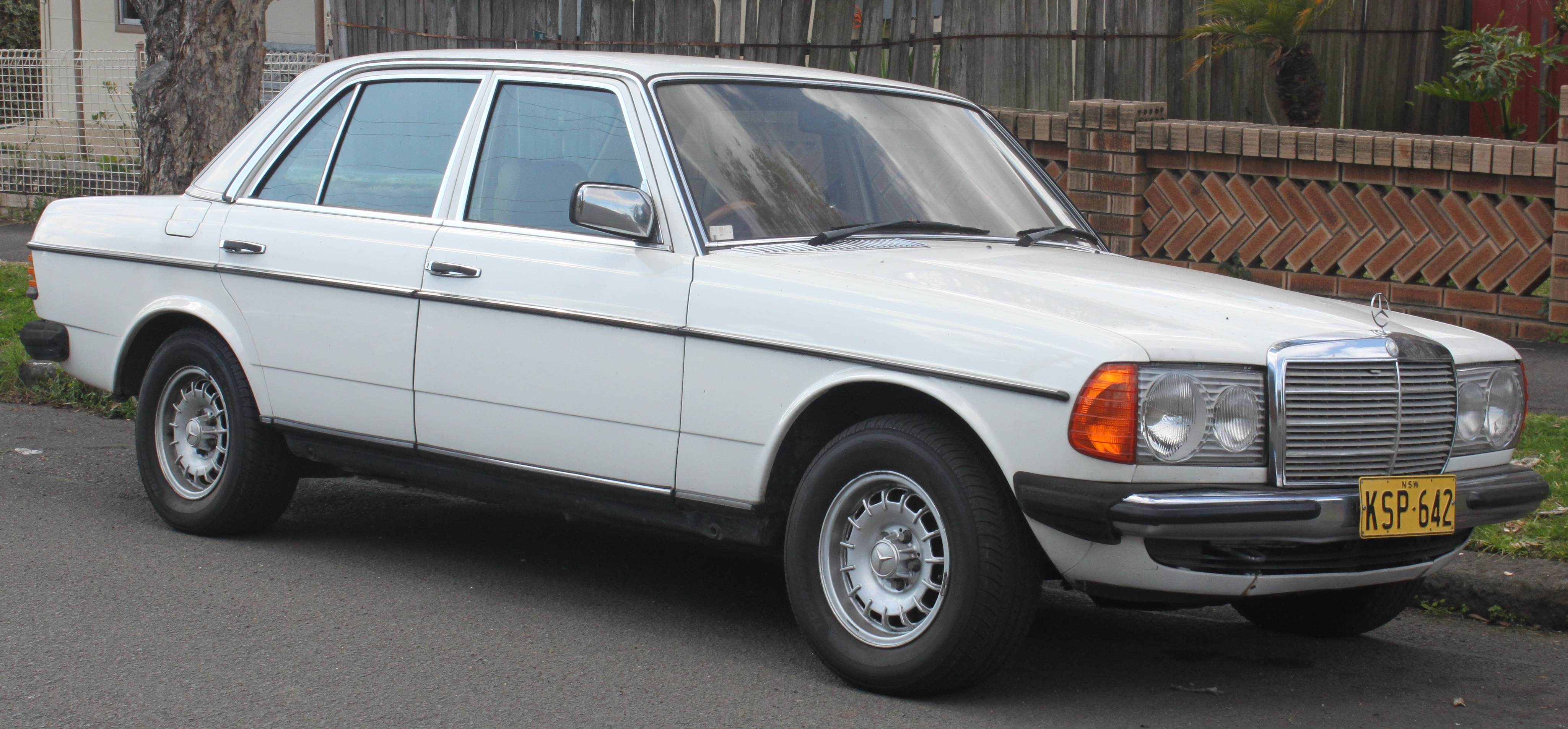 Mercedes Benz W123 300D